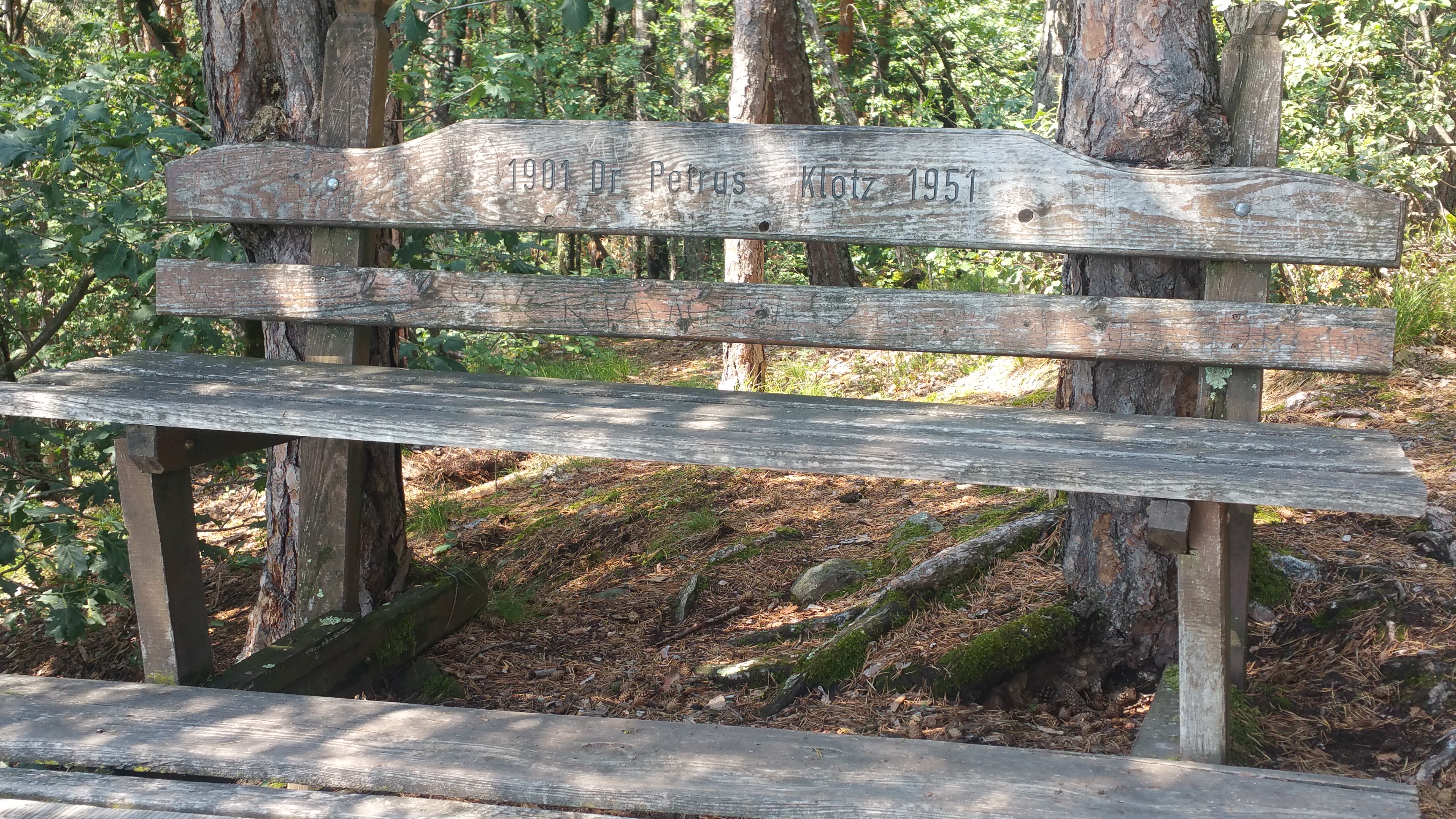 Aussichtspunkt "Klotzbankl" im Altenburger Wald bei Kaltern mit der Inschrift "1901 Dr. Petrus Klotz 1951"